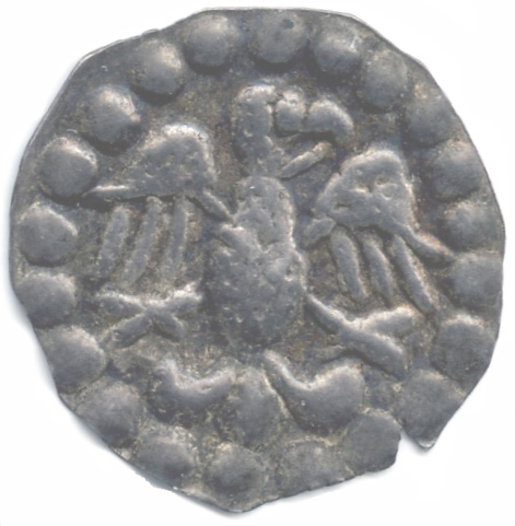 Pfennig Rottweil, um 1200-1220